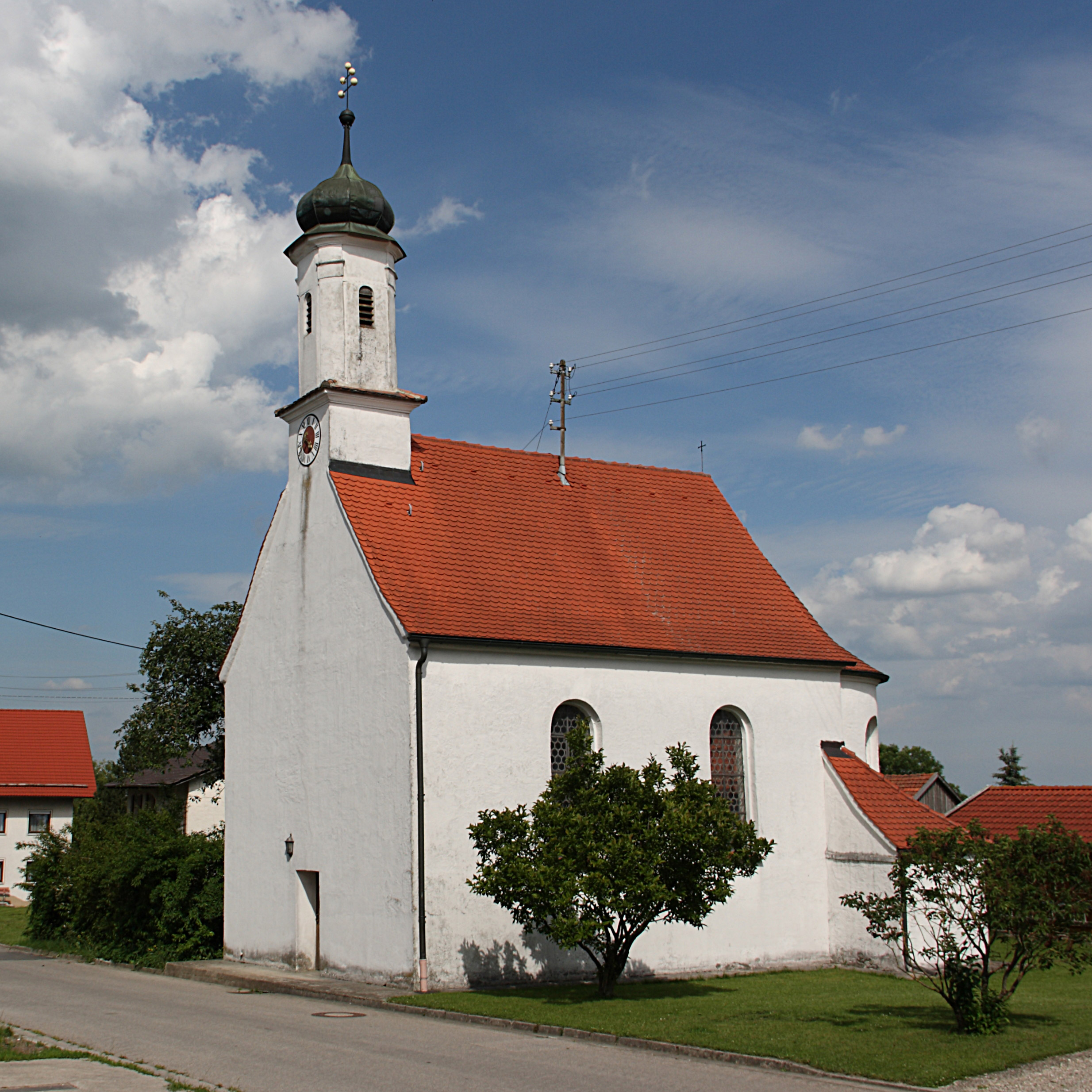 Ansicht von Nordwesten